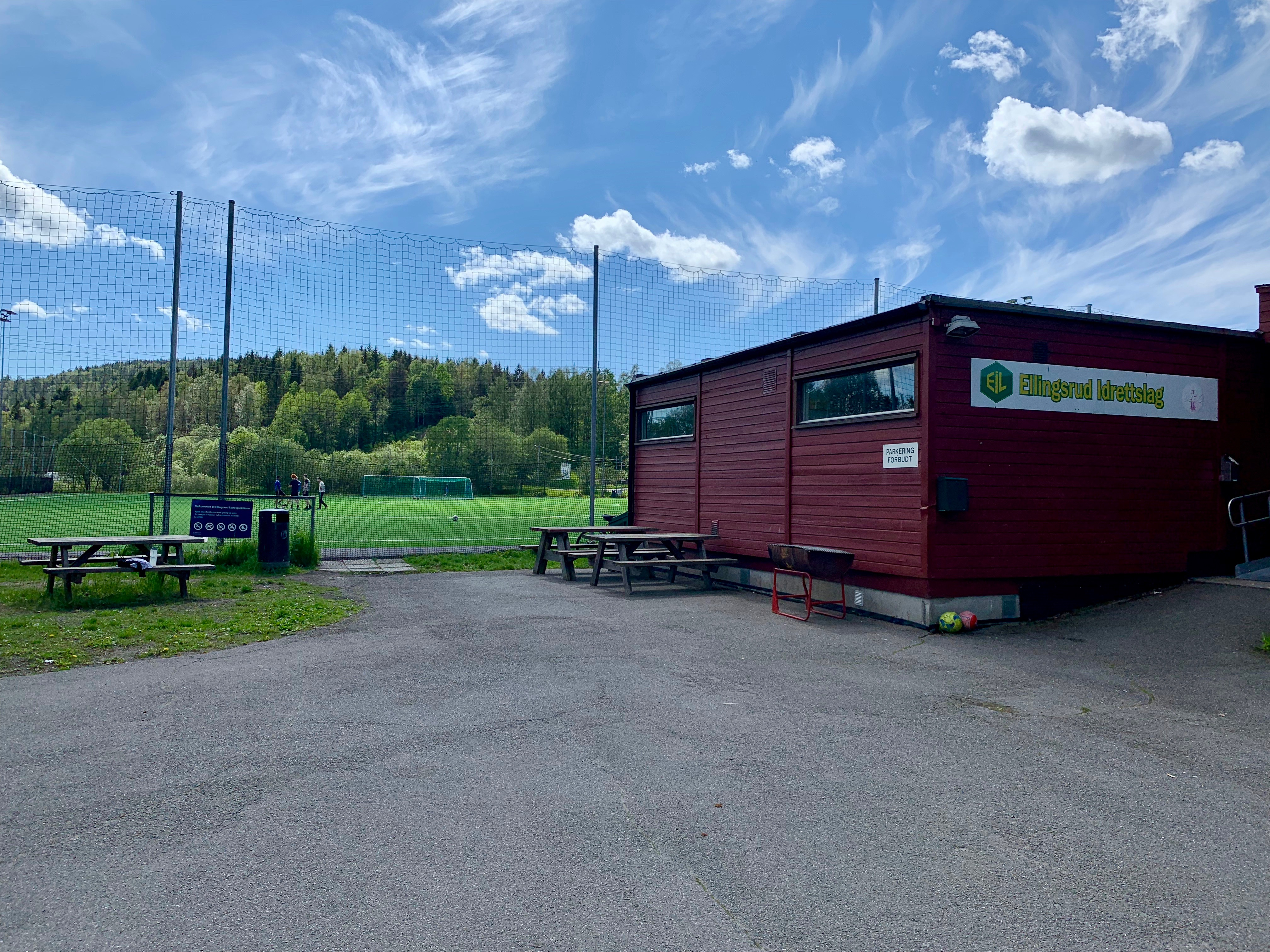 Ellingsrud flerbrukshall, Oslo.